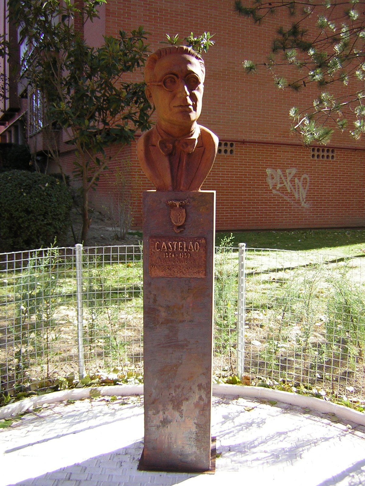 Monument to Castelao by Gonzalo Sanchez Mendizabal, Madrid (Covivar)